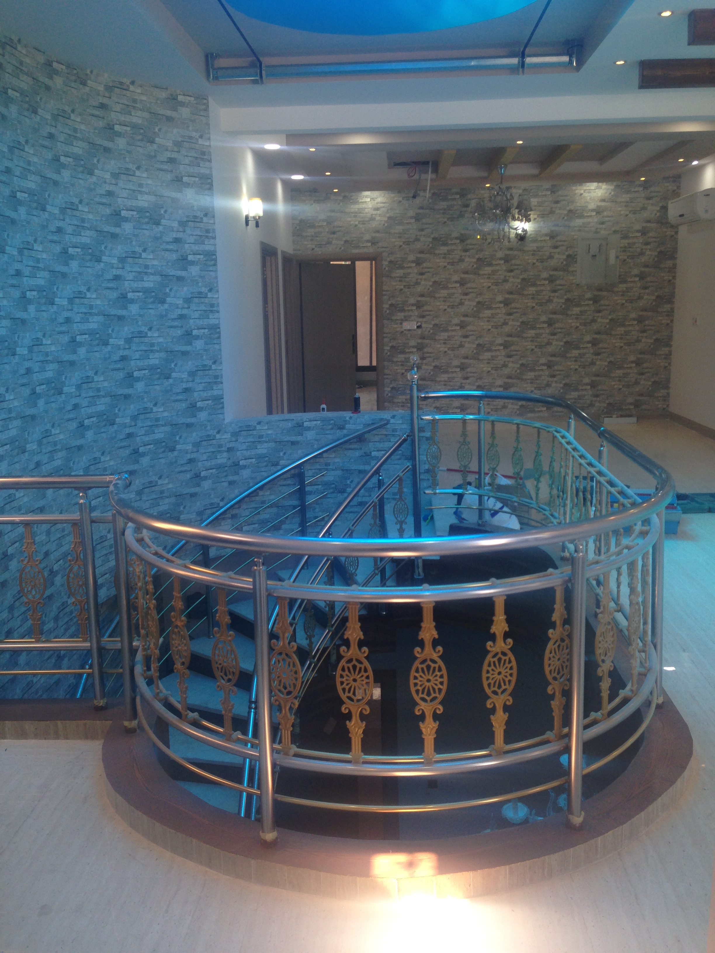 نرده فرفورژه ای گل دار اصفهان آلفام